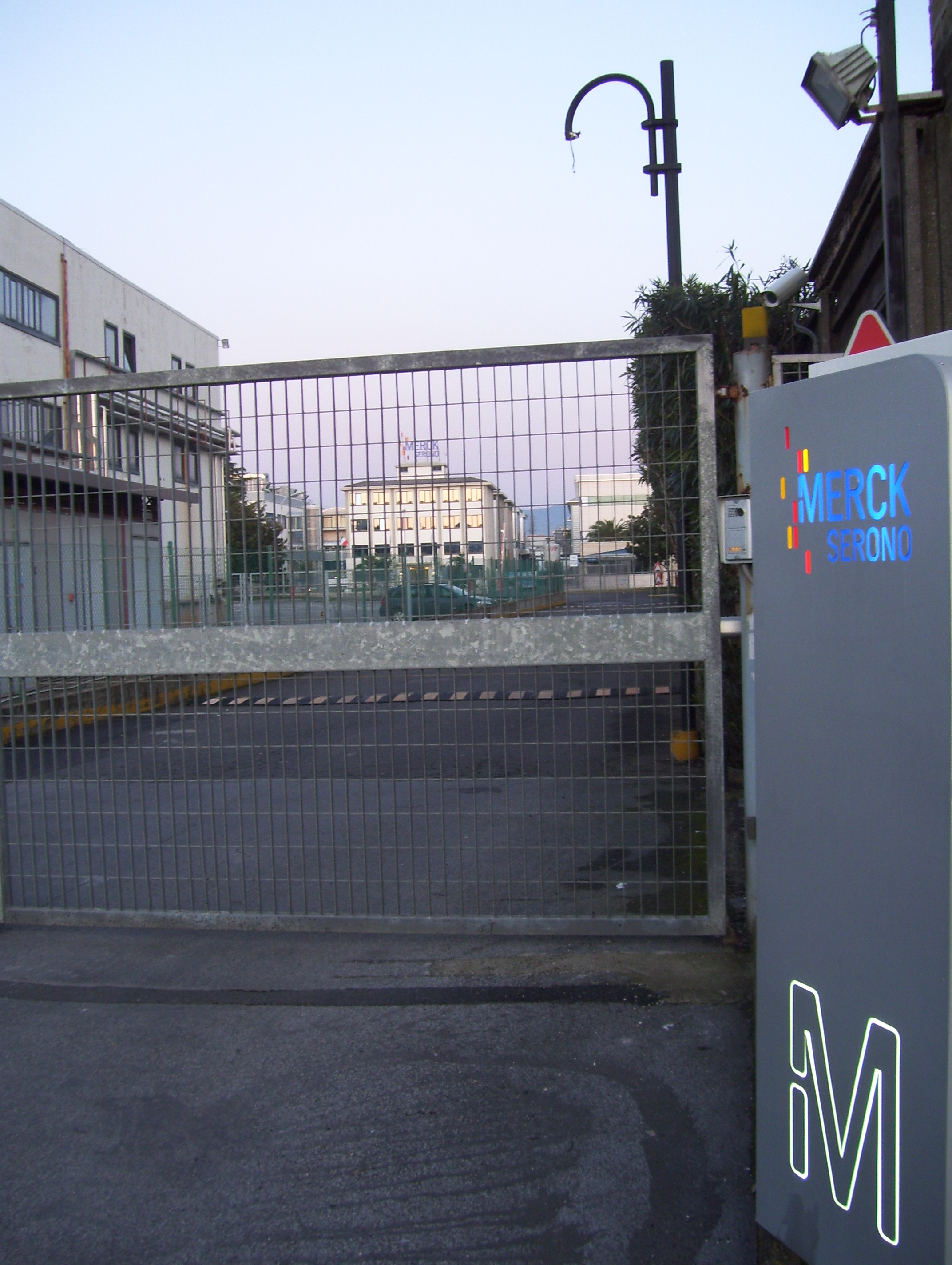 Entrata della Merck Serono a Guidonia.